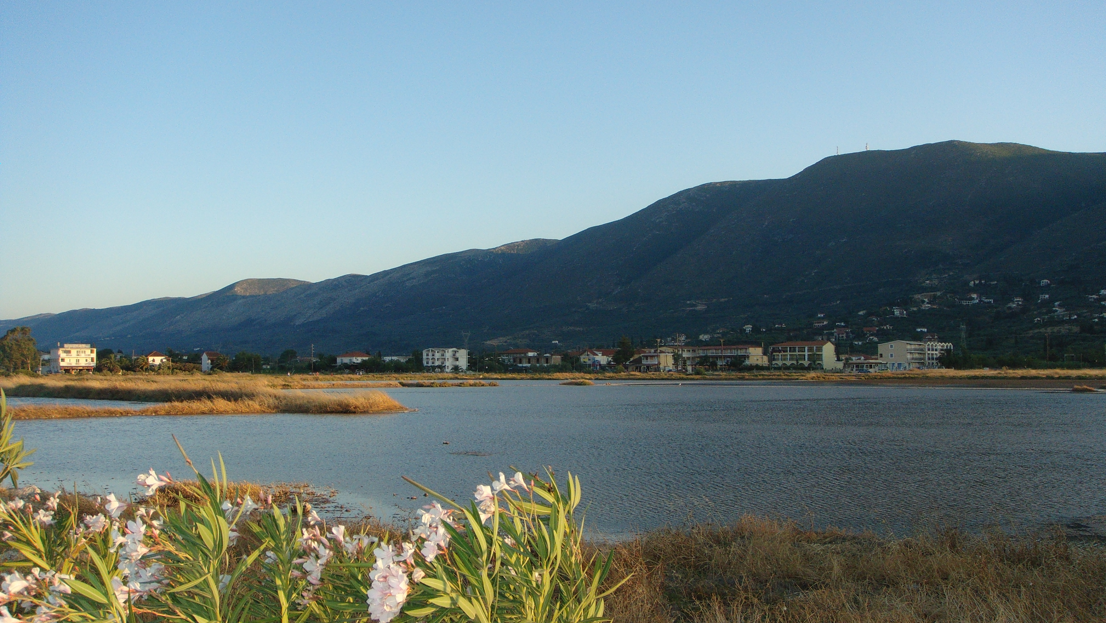 Katastari 290 90, Greece